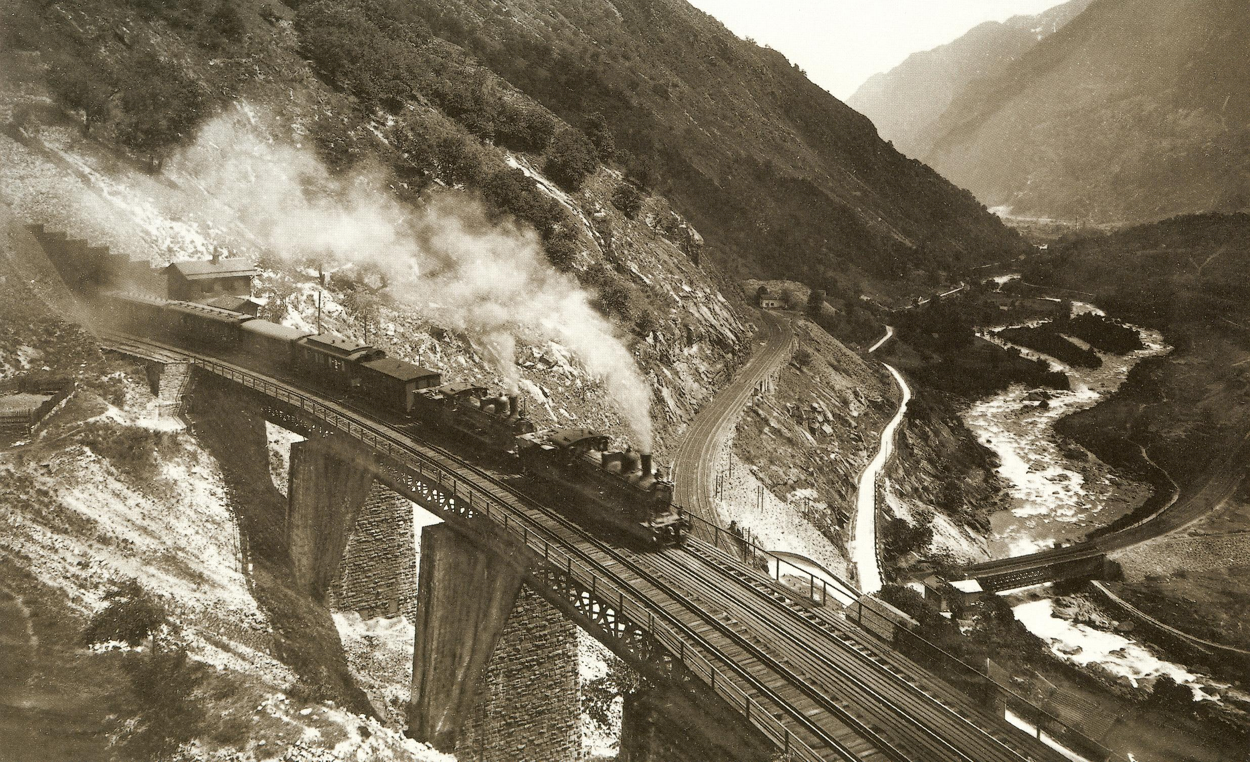 Bergwärts fahrender Schnellzug der Gotthardbahn mit zwei Lokomotiven der 1. Serie A 3/5 Nr. 201-230 zwischen Lavorgo und Bodio, vorn der Pianotondo-Viadukt mit (links) dem Eingang zum Pianotondo-Kehrtunnel.